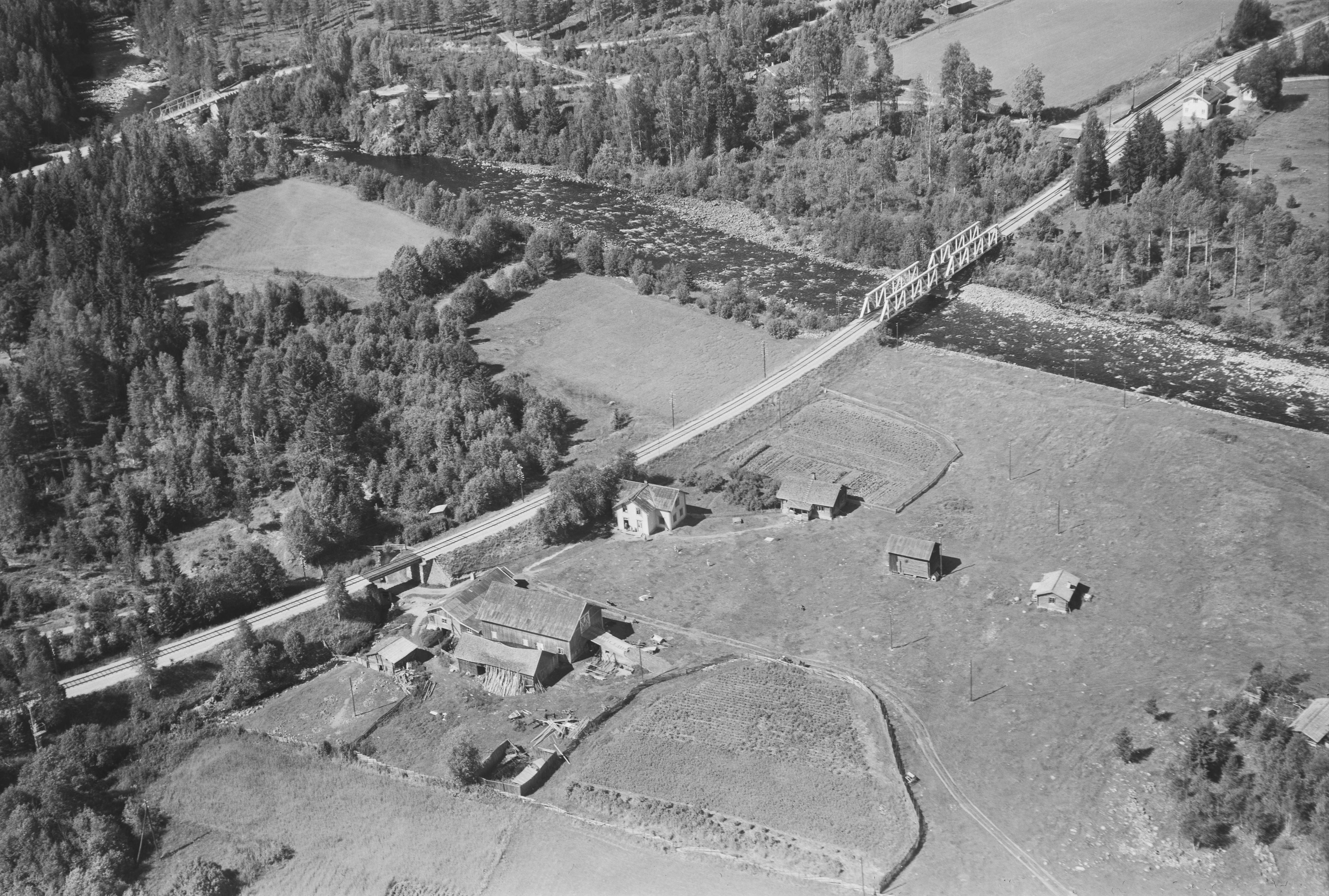 Inn mot Åsta stasjon sørfra. Widerøe-bilde fra Nasjonalbibliotekets samling.